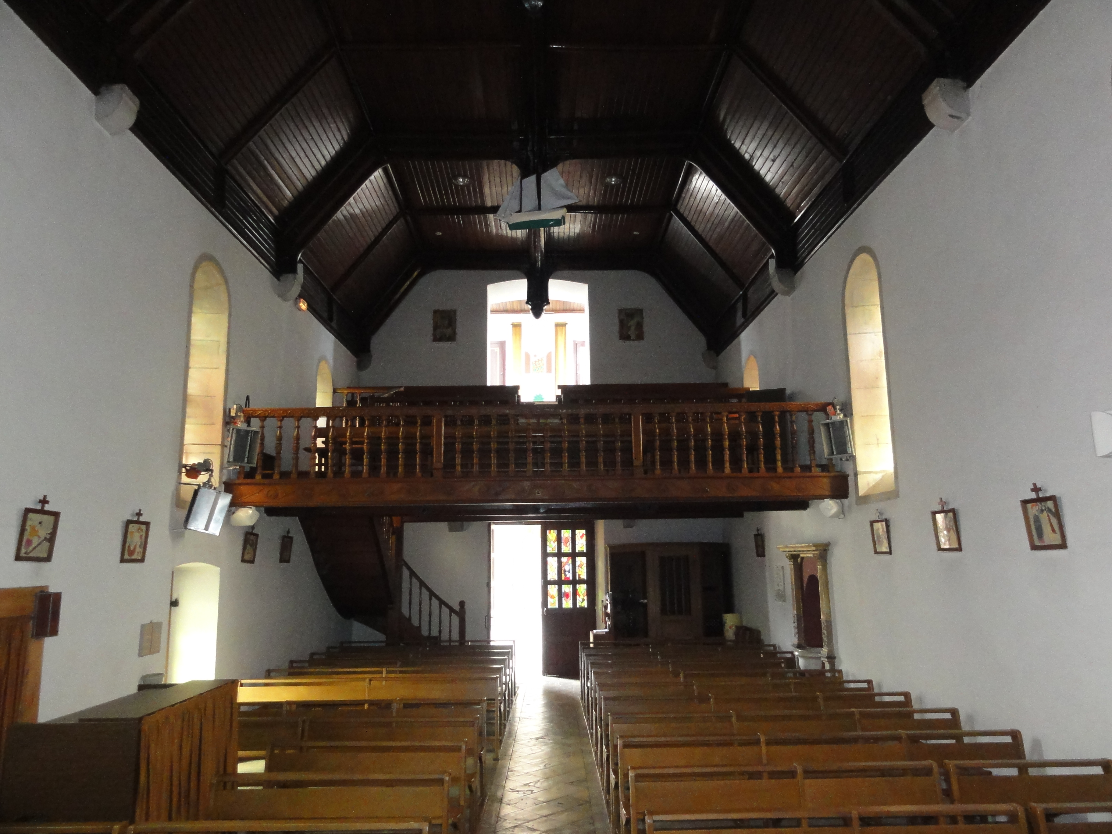 Bassussarry interieur de l'église avec balcon